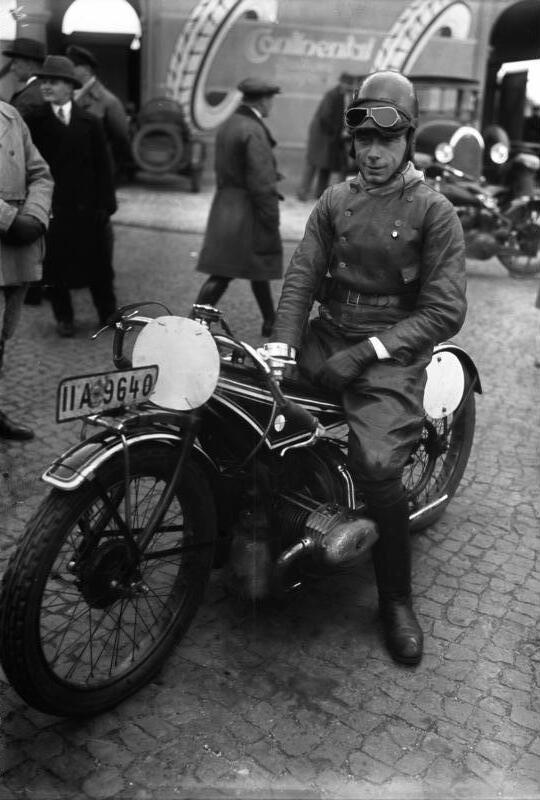 Soenius auf B.M.W.